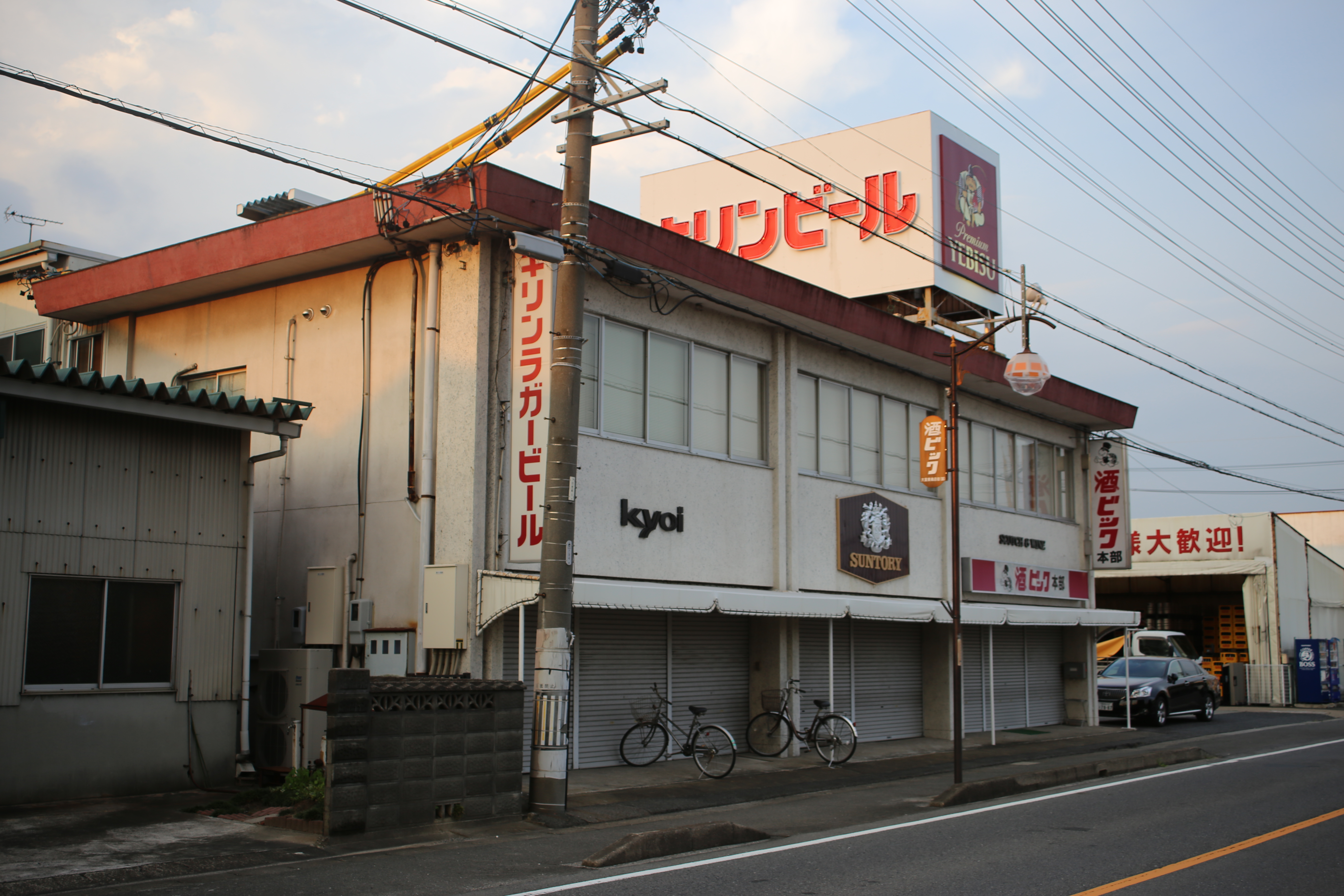 愛知県稲沢市井之口親畑町の藤桂京伊本社を南側公道西側より撮影